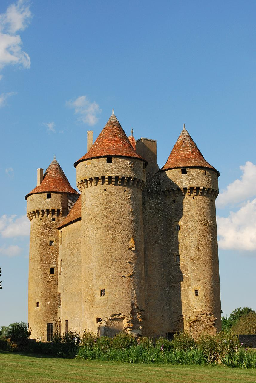 Sarsay (Indre, France) Le château.